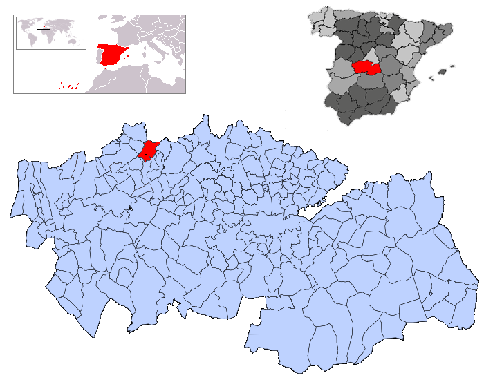 El Real de San Vicente en la provincia de Toledo